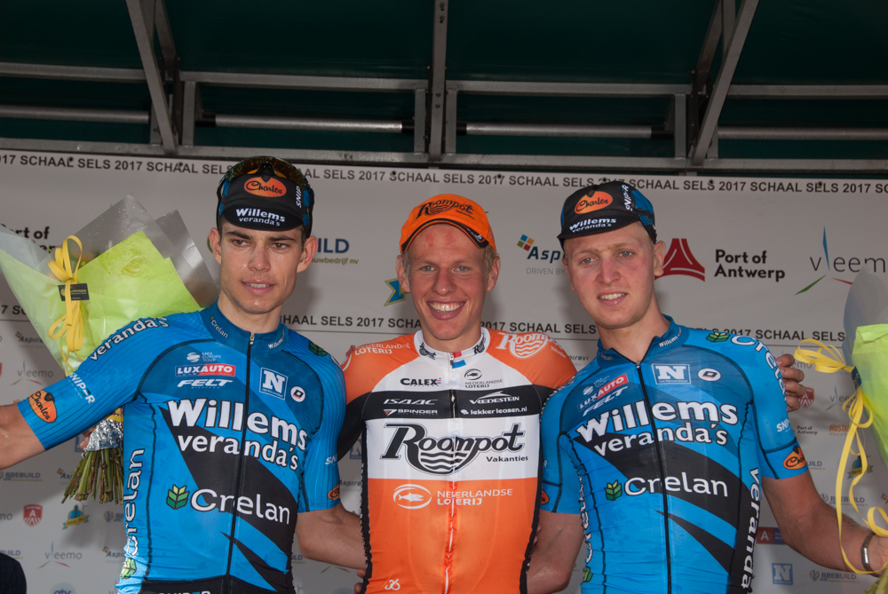 Schaal Sels 2017: Wout Van Aert (2), Taco van der Hoorn (1), Tim Merlier (3)